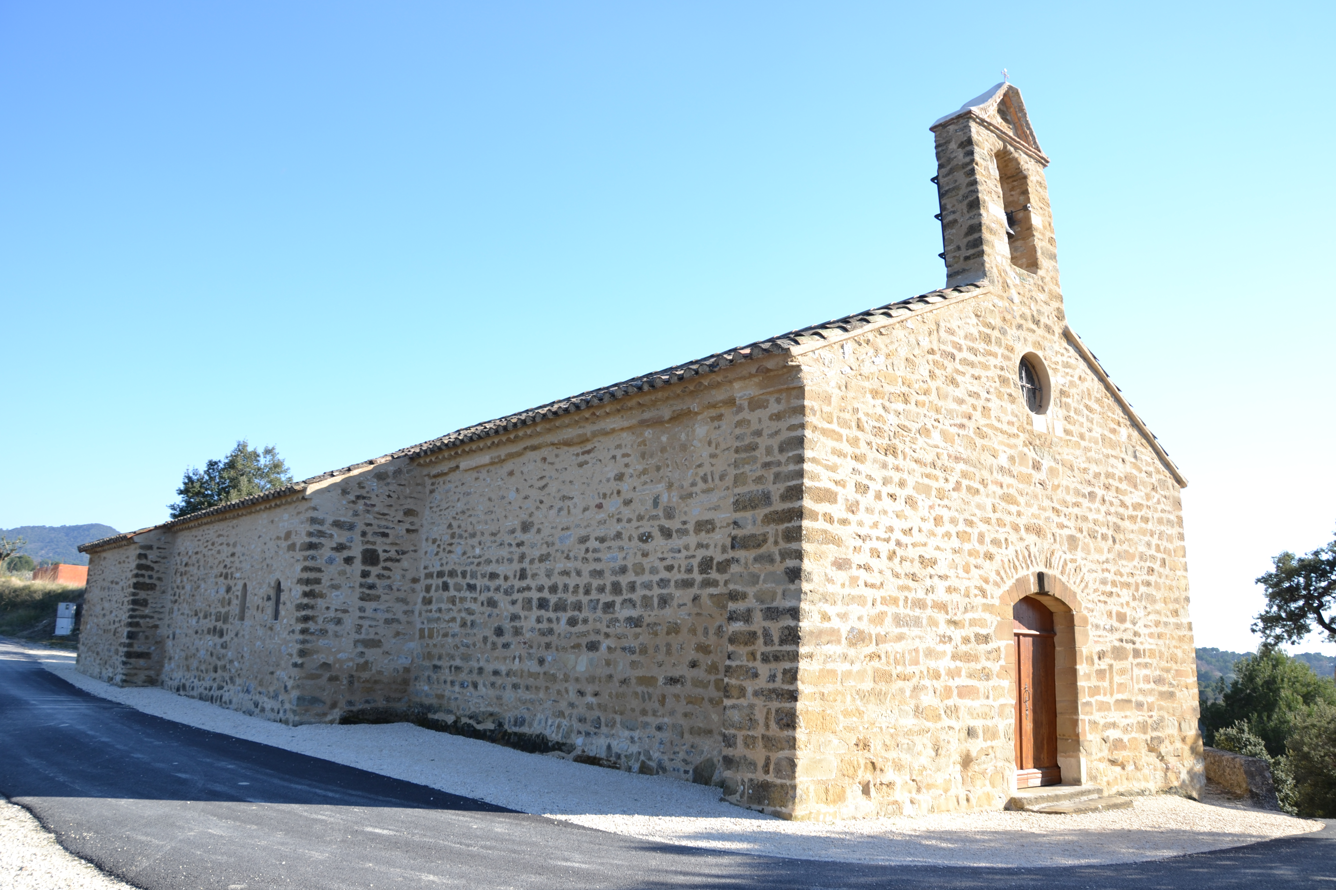 Chapelle Notre Dame de Cadenet, à Piégon (26)